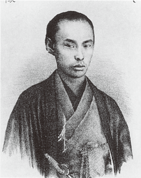 松平武聰の肖像。